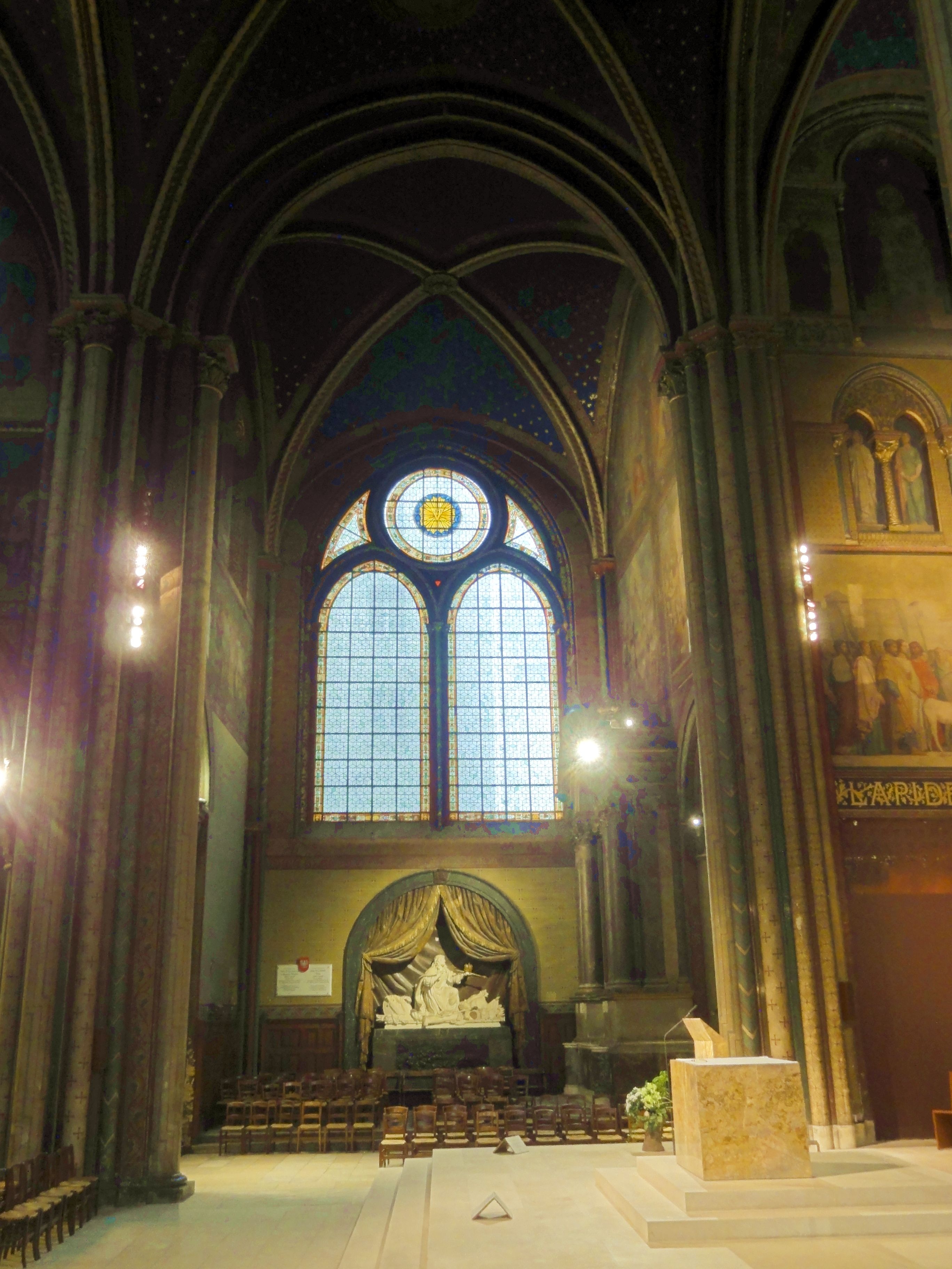 Croisée, vue vers le nord.